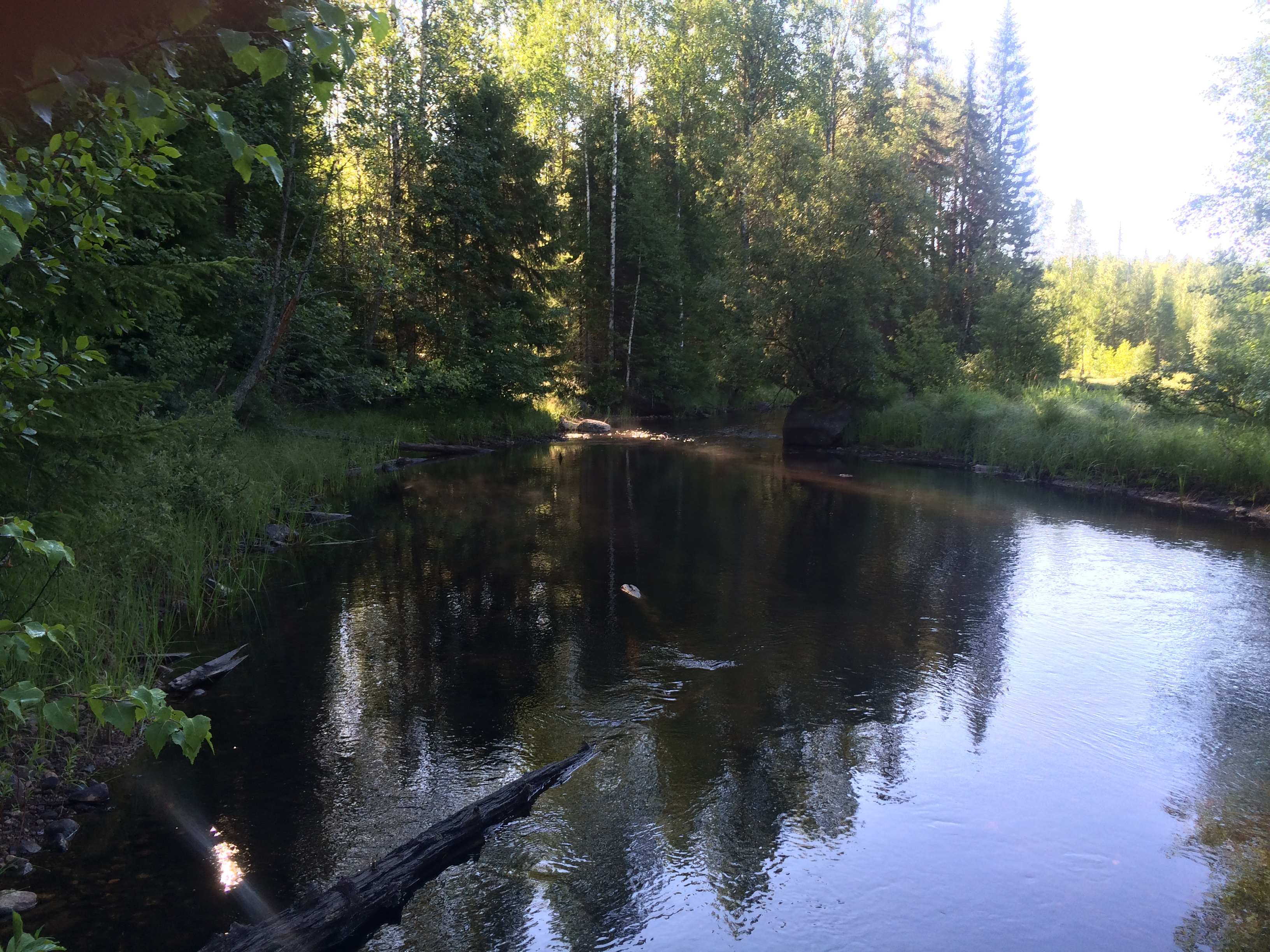 Ирста